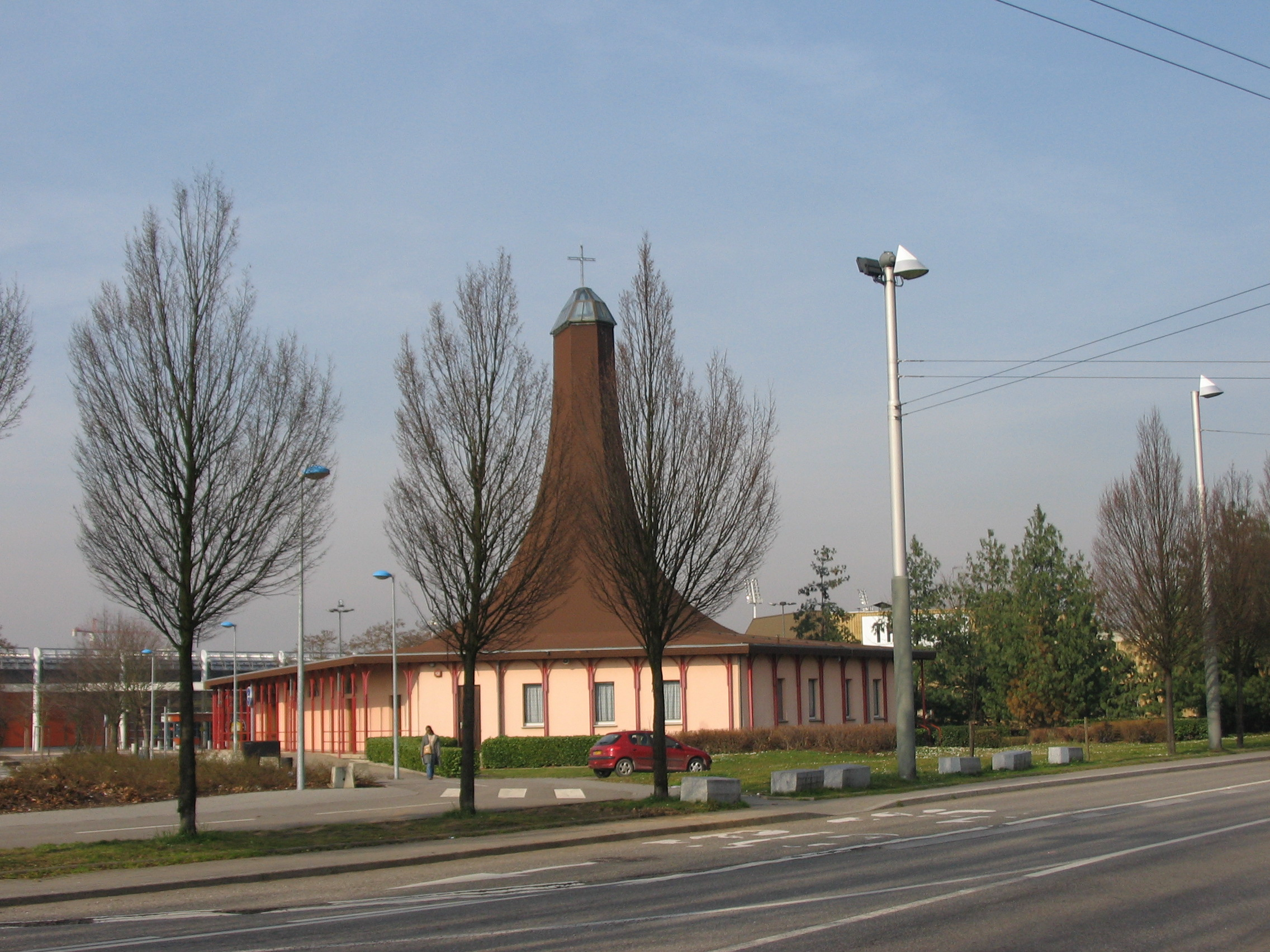 Hautepierre - Eglise catholique de St. Benoît de Nursie